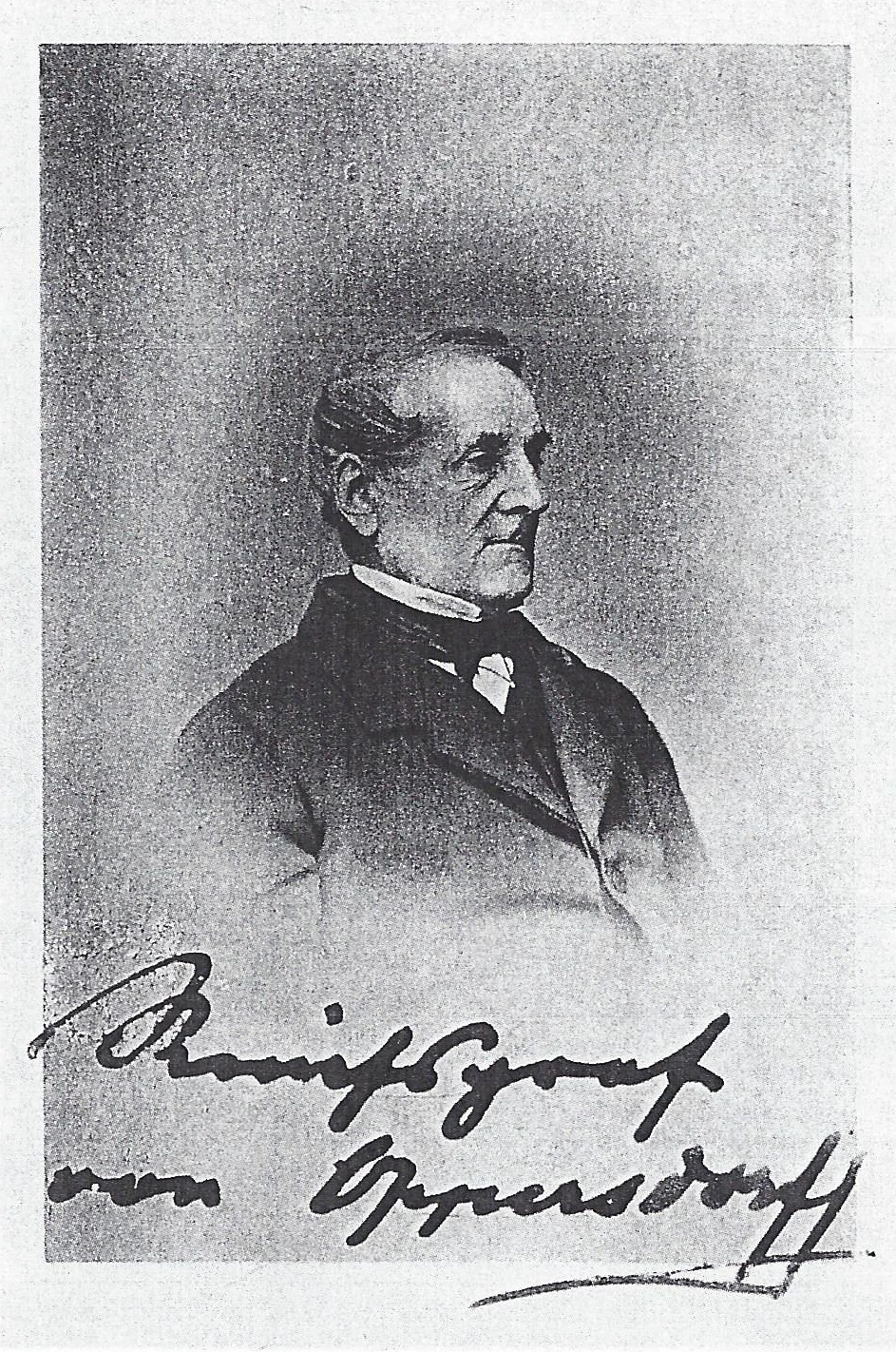 Signierte Porträtfotografie von Reichsgraf Eduard von Oppersdorf (1800-1889)